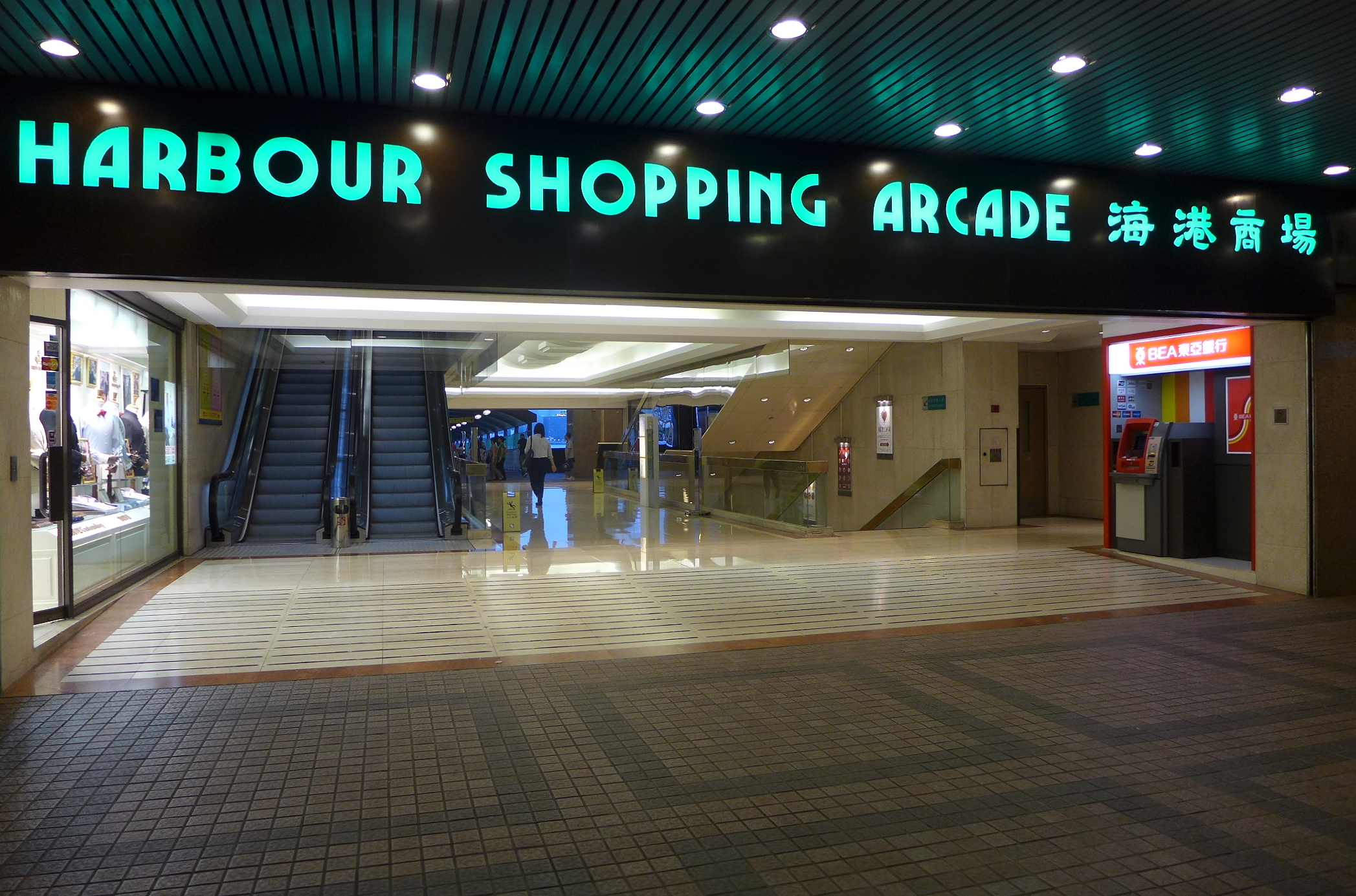 Harbour Centre Entrance